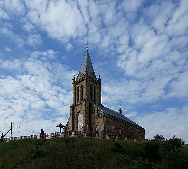 Касцёл Унебаўзяцця Найсвяцейшай Дзевы Марыі